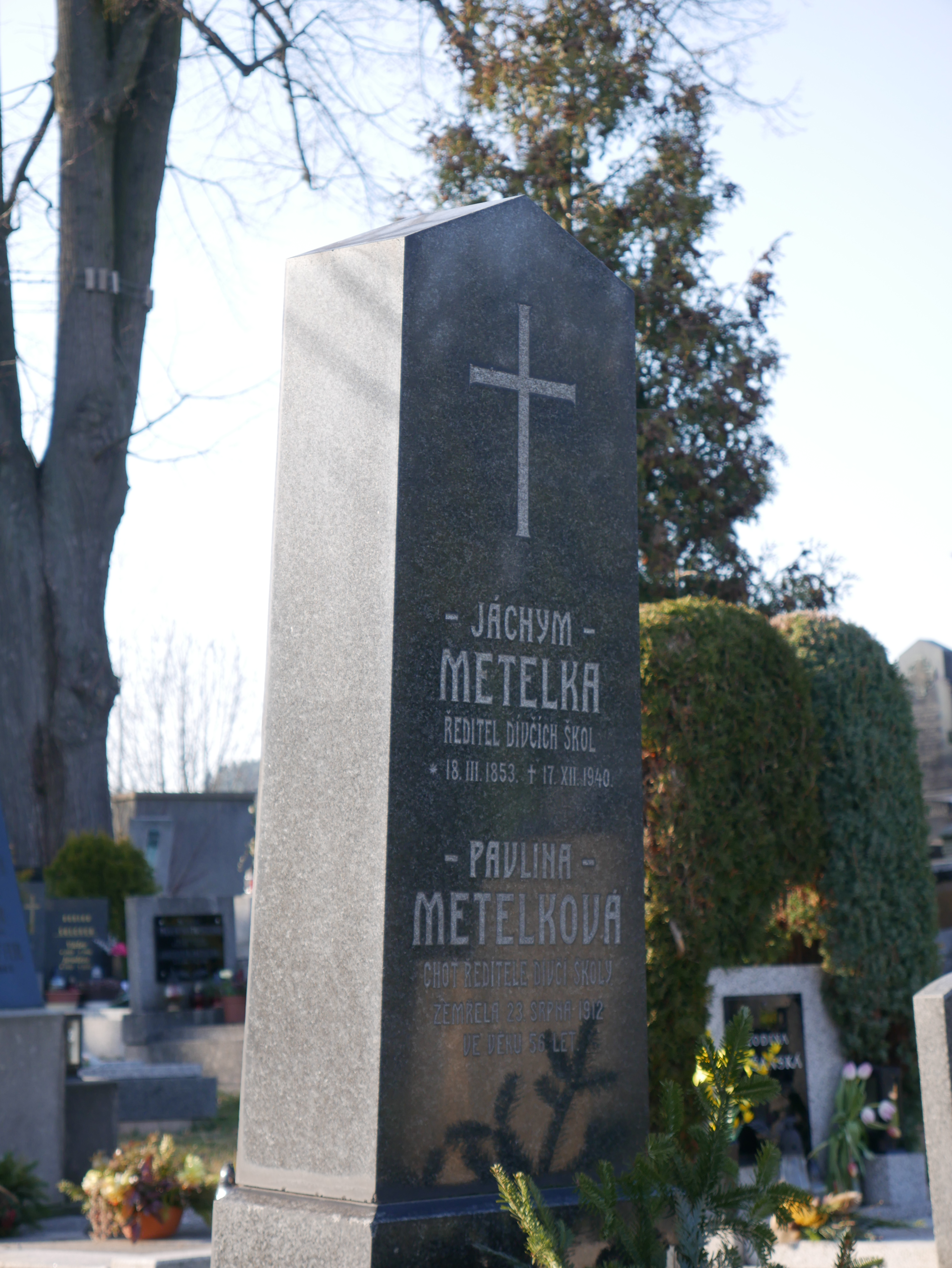 Hrob jilemnického učitele Jáchyma Metelky